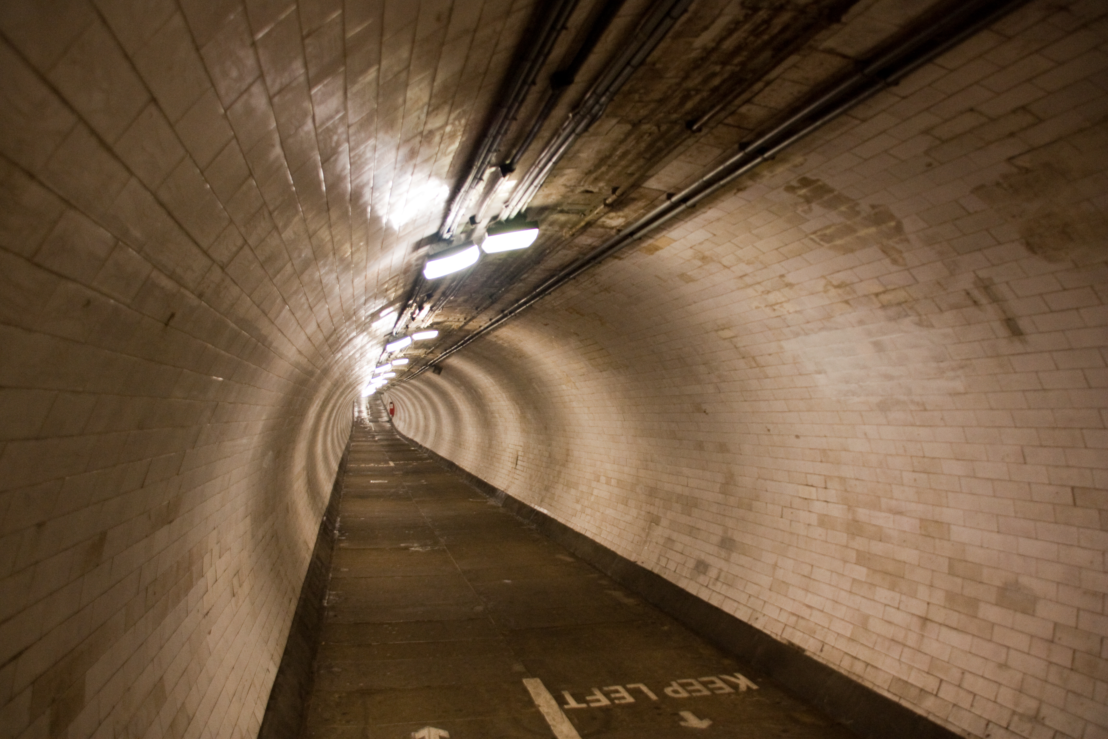 Tunnel pietion de Greenwich, Londres, UK